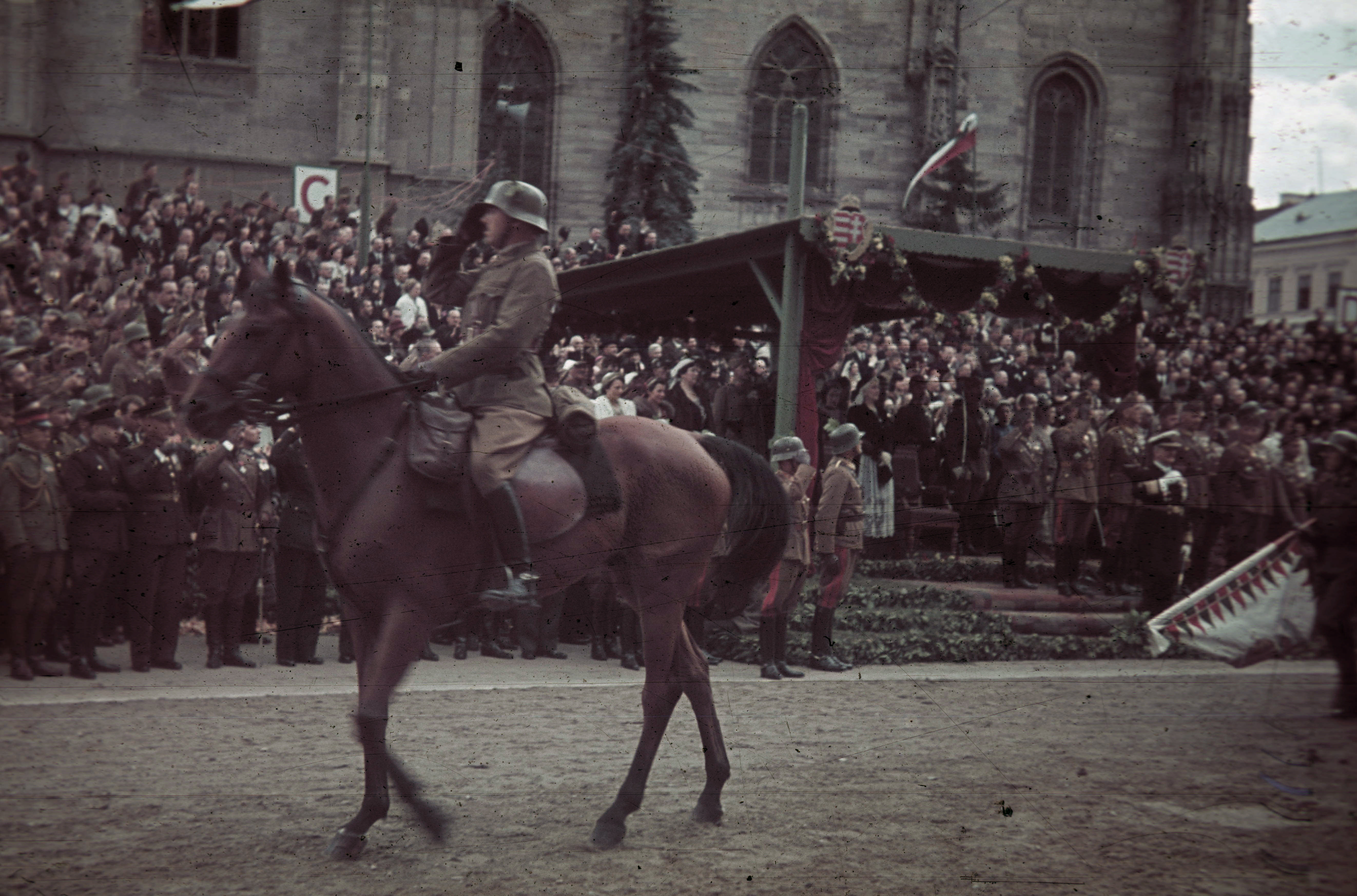 Kolozsvár, Fő tér a magyar csapatok bevonulása idején, a Szent Mihály-templom előtti emelvénynél Horthy Miklós. A felvétel 1940. szeptember 11-én készült Location: Romania, Transylvania, Cluj-Napoca Tags: territorial gain, national emblem, colorful Title: Fő tér a magyar csapatok bevonulása idején, a Szent Mihály-templom előtti emelvénynél Horthy Miklós. A felvétel 1940. szeptember 11-én készült